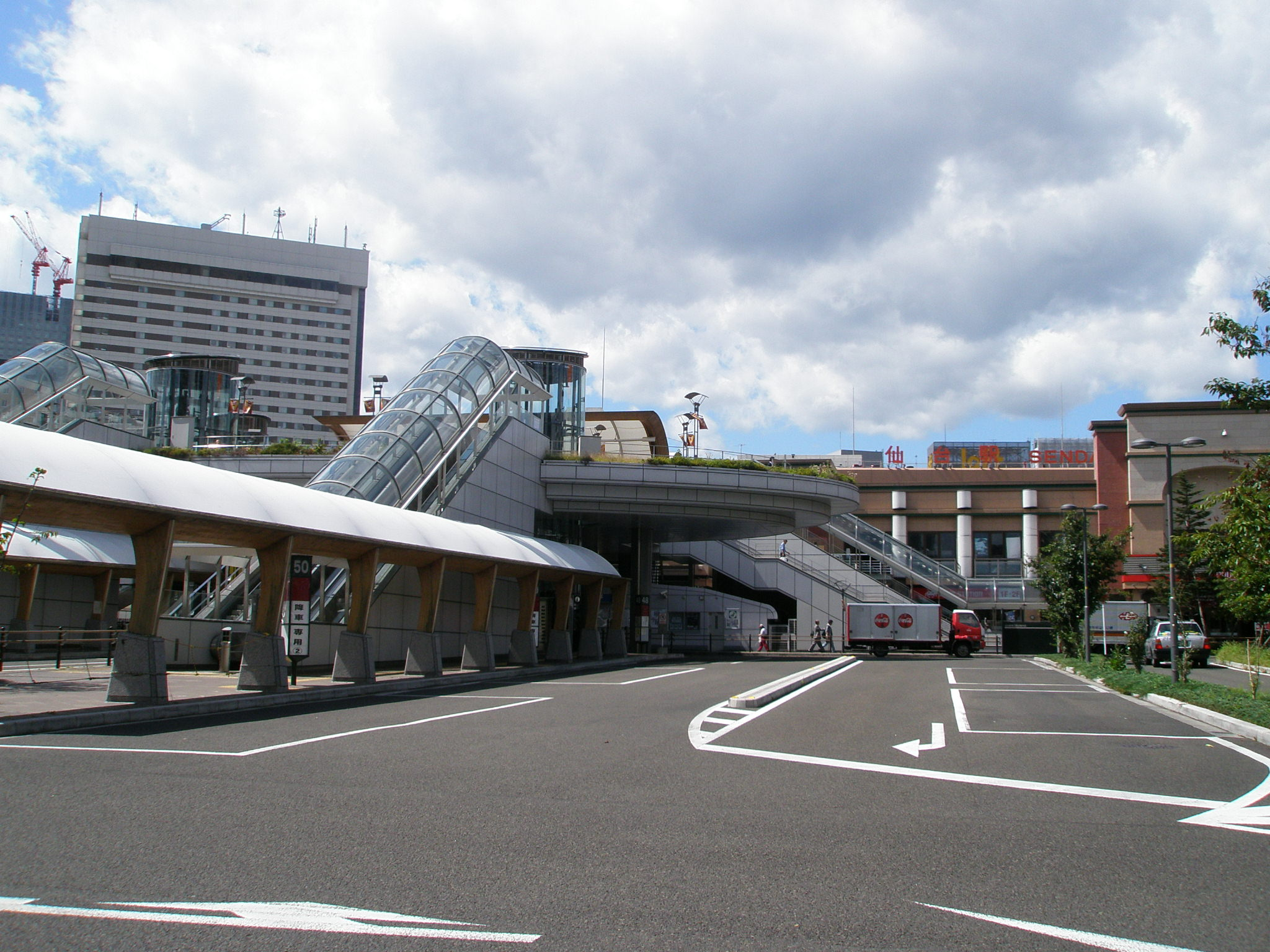 仙台駅東口（2009年9月）